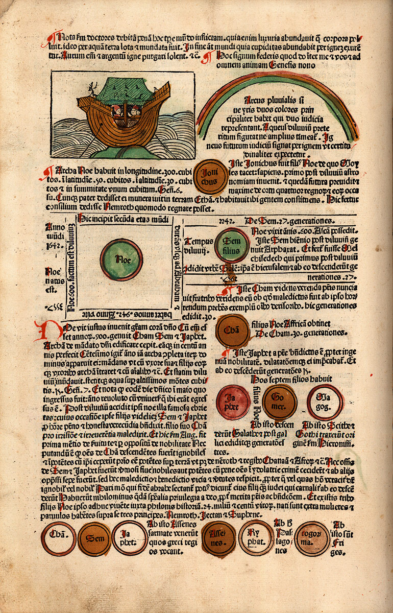 Seite aus: Werner Rolevinck: Fasciculus temporum, Köln, Ludwig von Renchen, um 1483